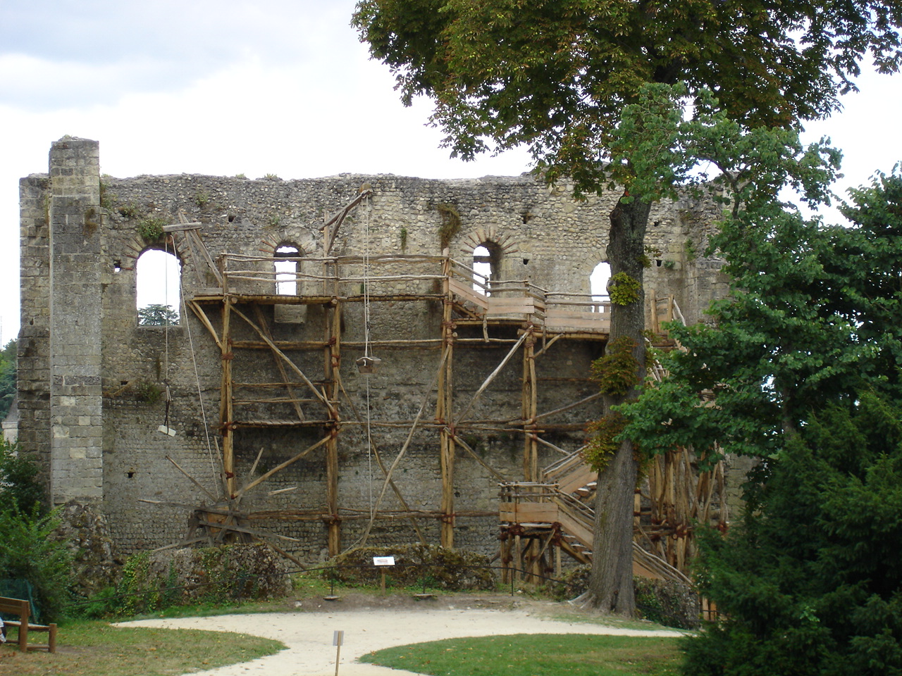 Donjon de Langeais, bâti par Foulques Nerra